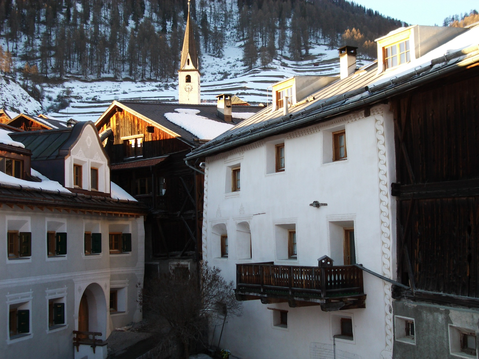 Ardez GR, Switzerland self-made, March 2005